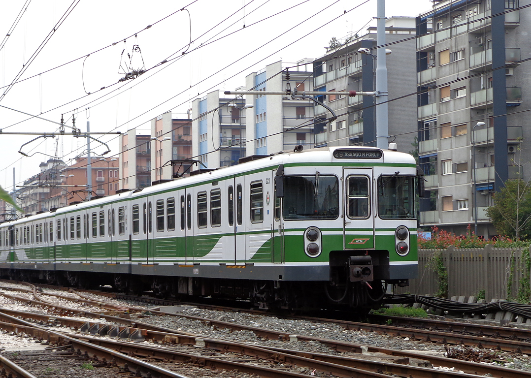 Unità di trazione della linea M2 della metropolitana di Milano in corsa lungo il tracciato di via Palmanova, diretto ad Assago Forum. In primo piano la vettura 323.